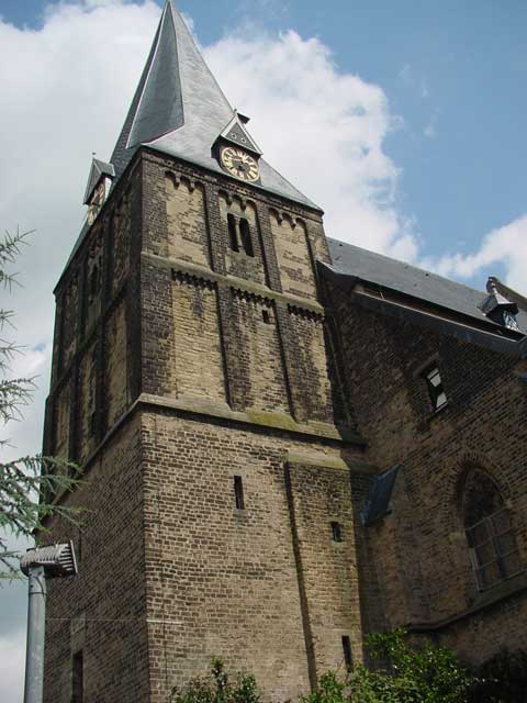 Church "Sint Helenakerk" of Aalten